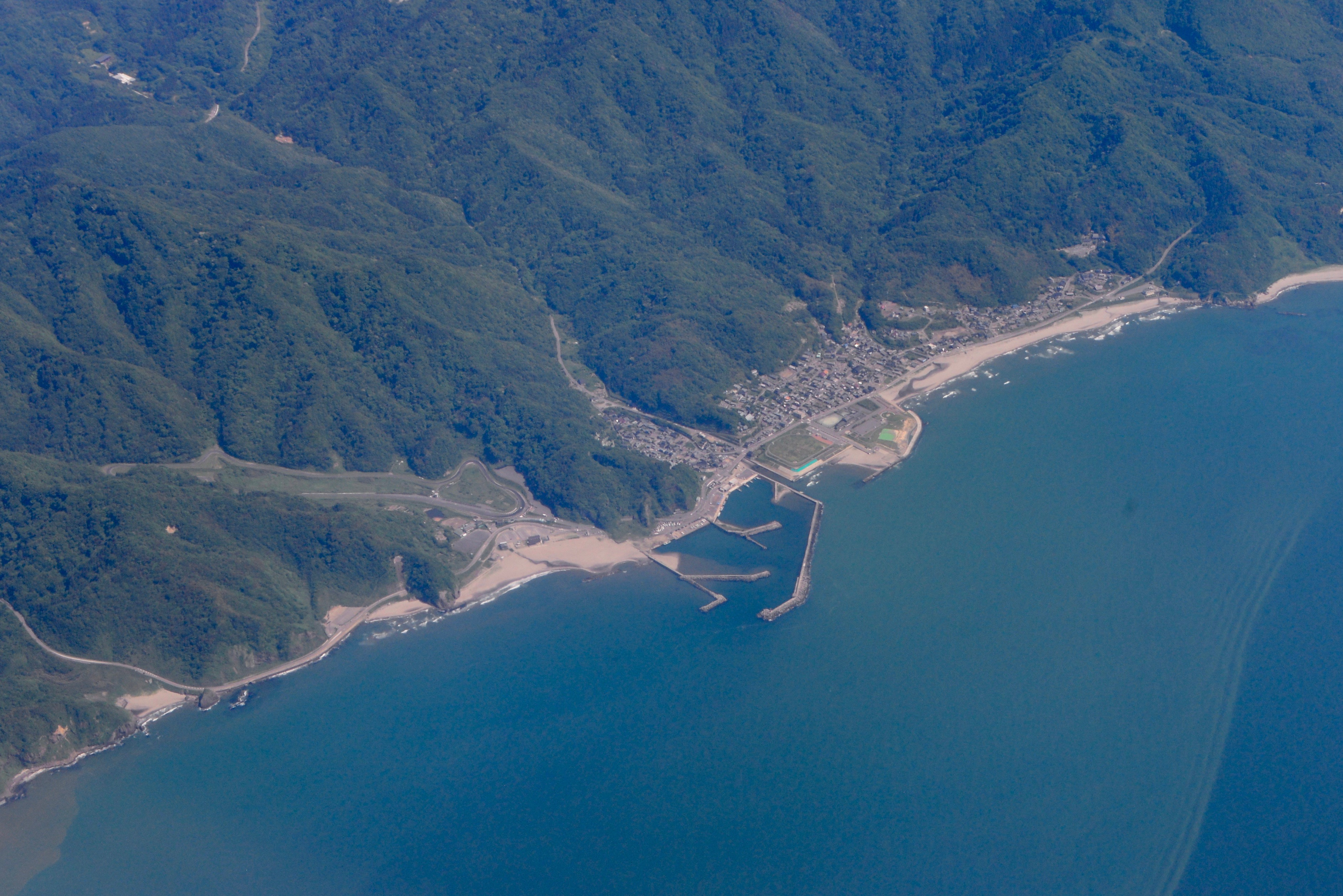 新潟市西蒲区間瀬